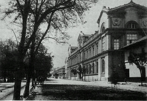 Casa Central de la Universidad de Chile durante el siglo XIX.